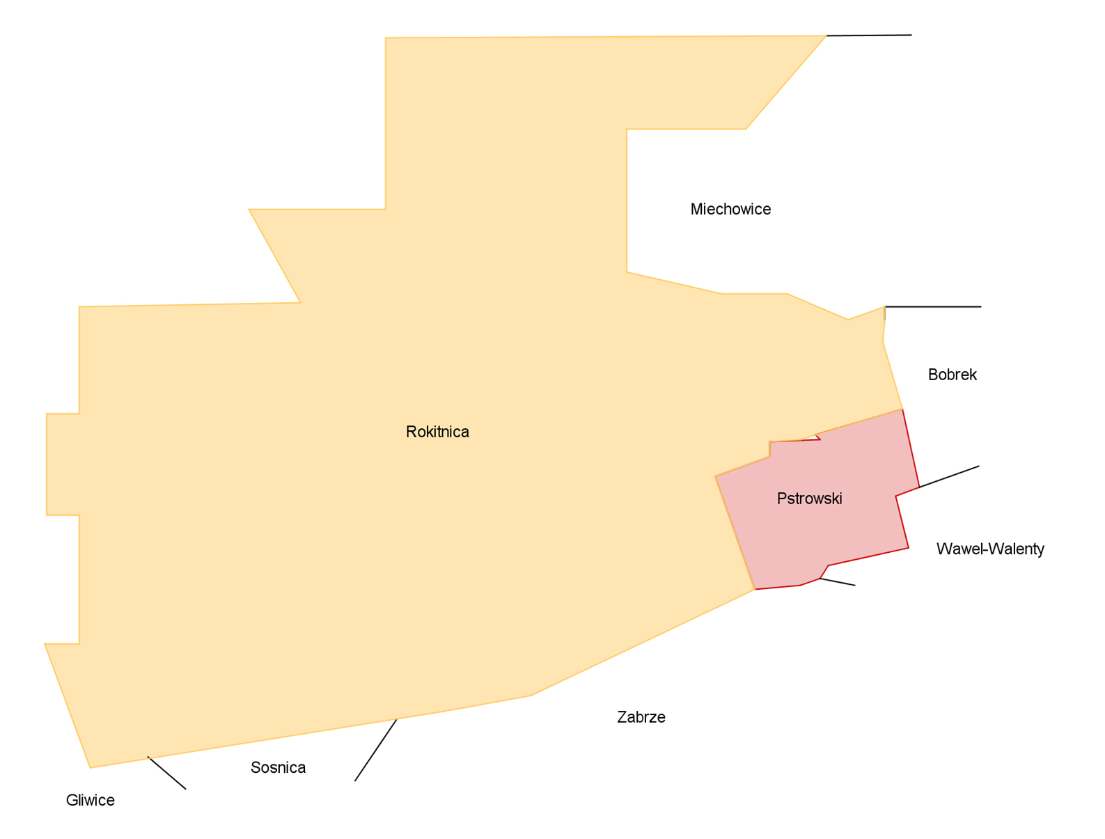 Berechtsame der Bergwerke im Norden von Zabrze Situation 1970